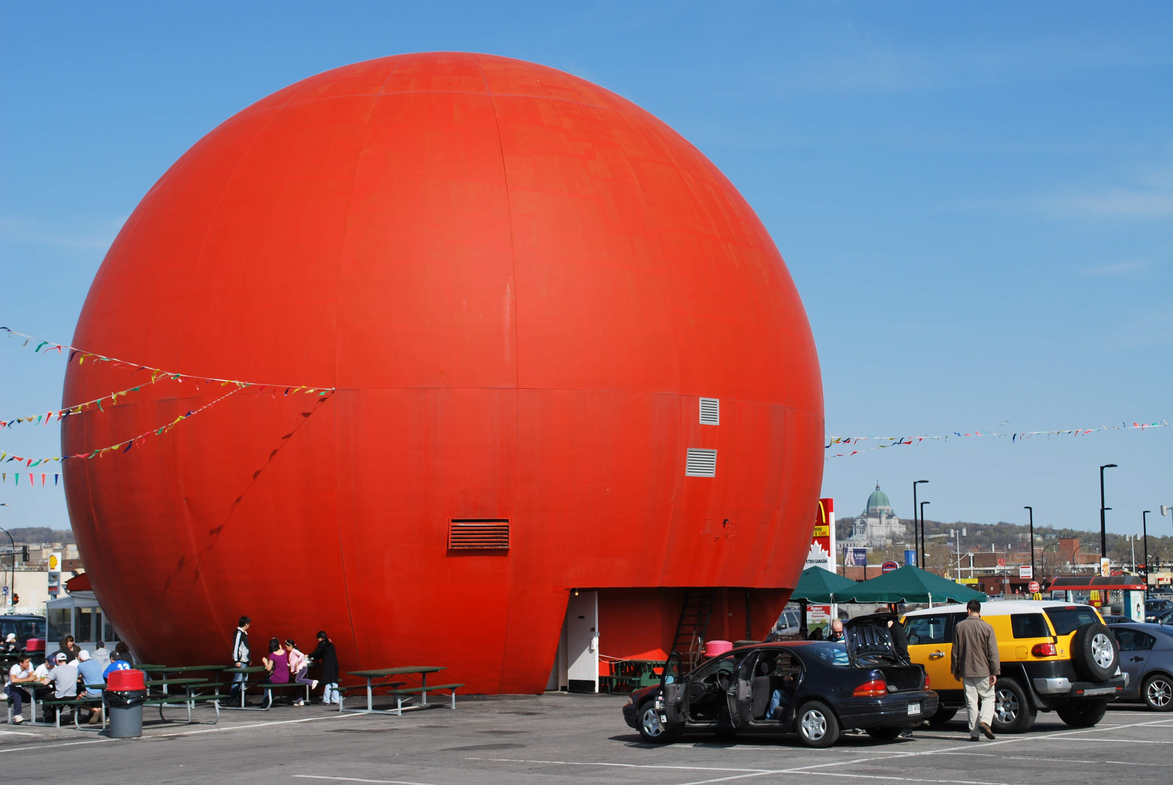 Restaurant Gibeau Orange Julep à Montréal.